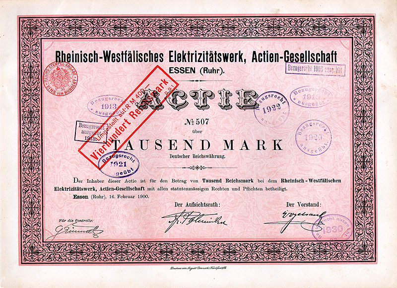 Aktie über 1000 Mark der Rheinisch-Westfälisches Elektrizitätswerk AG vom 16. Februar 1900